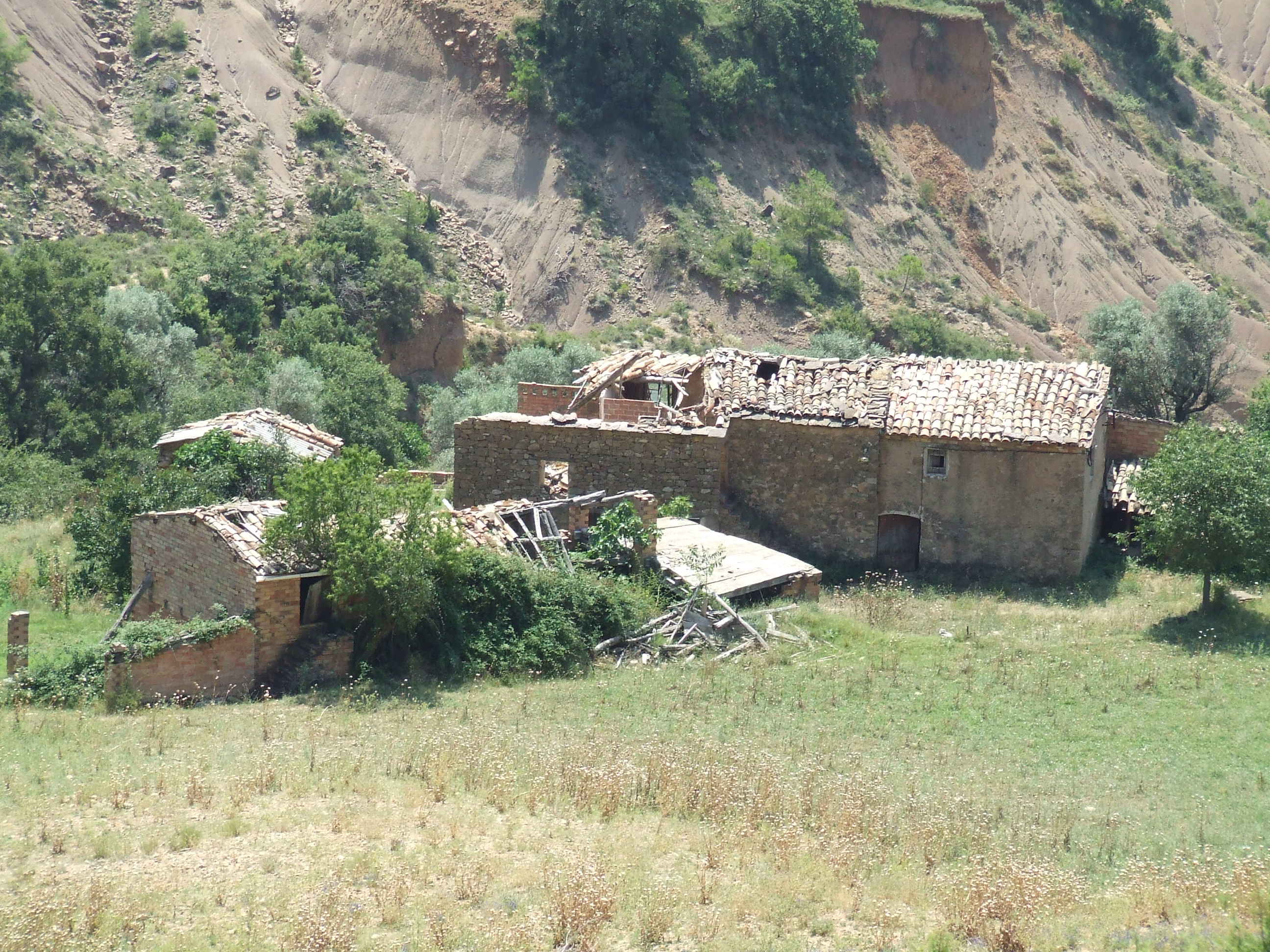 Cal Moixarda (Abella de la Conca, Pallars Jussà)